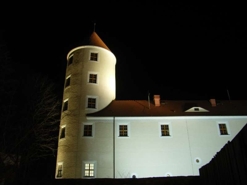 Turm des Schlosses Freudenstein in Freiberg/Sachsen